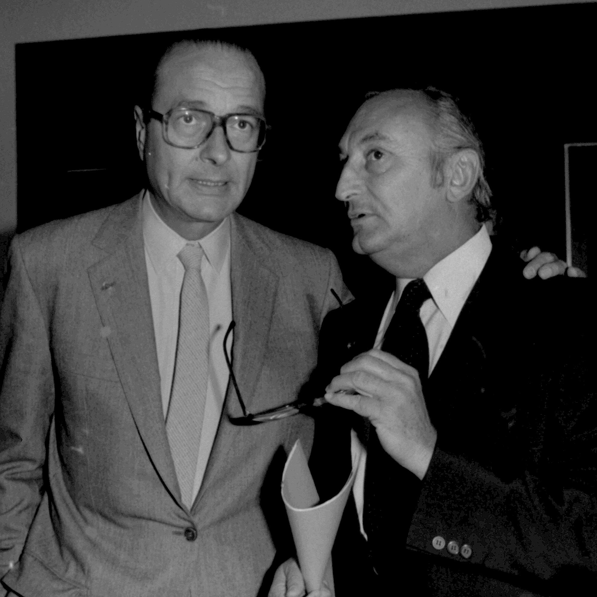 Jacques Chirac et André Bord aux journées parlementaires du RPR le 29 septembre 1980